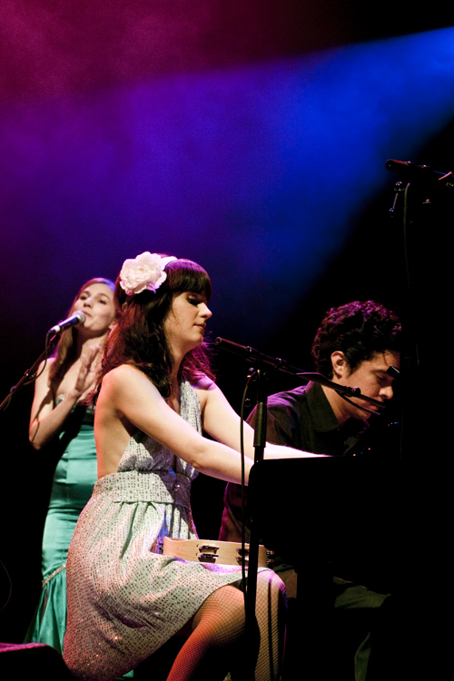 Terminal 5, NYC